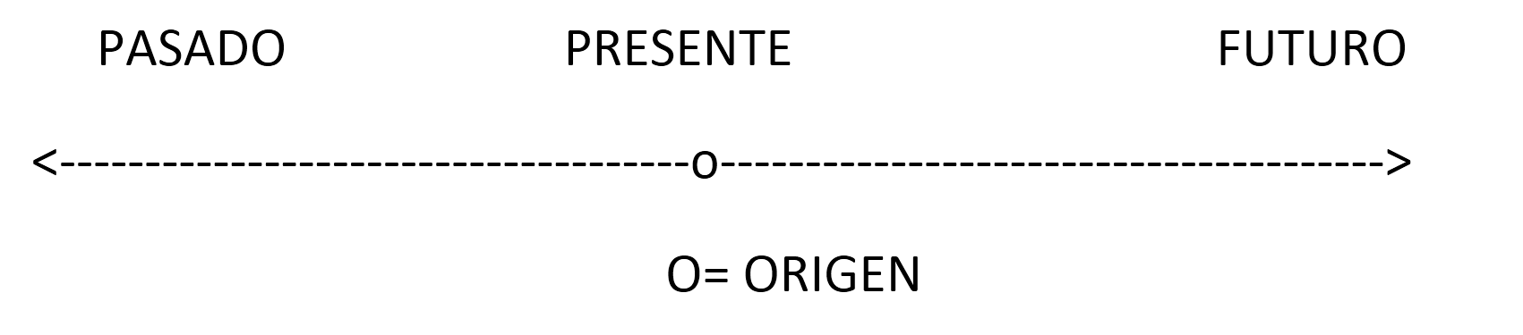 Recta representativa del Tiempo